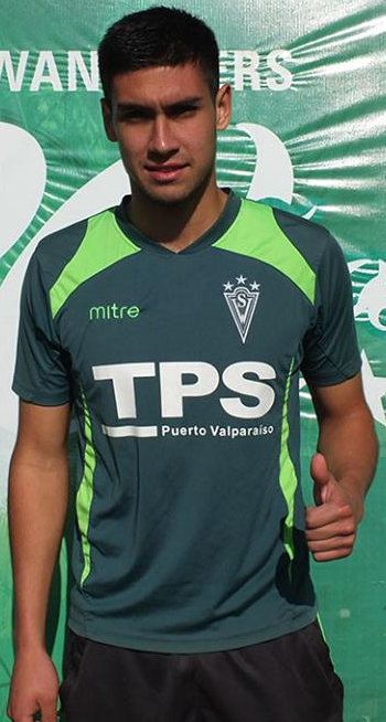 Edición de la fotografía "ReinaldoAhumada.jpg", que muestra al jugador de fútbol Reinaldo Ahumada.